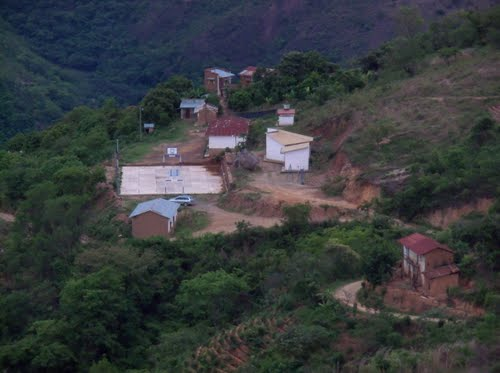 Bolivia